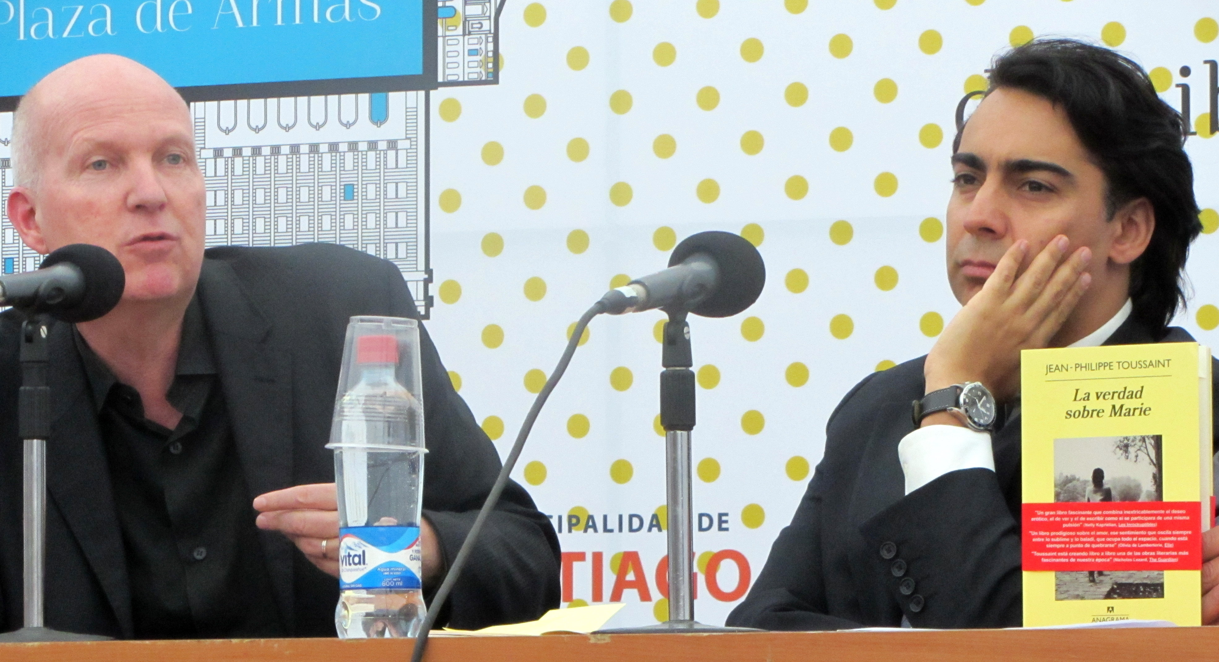 El escritor belga Jean-Philippe Toussaint y el político chileno Marco Enríquez-Ominami en la Fiesta del Libro de la Plaza de Armas de Santiago, 23 de abril de 2013